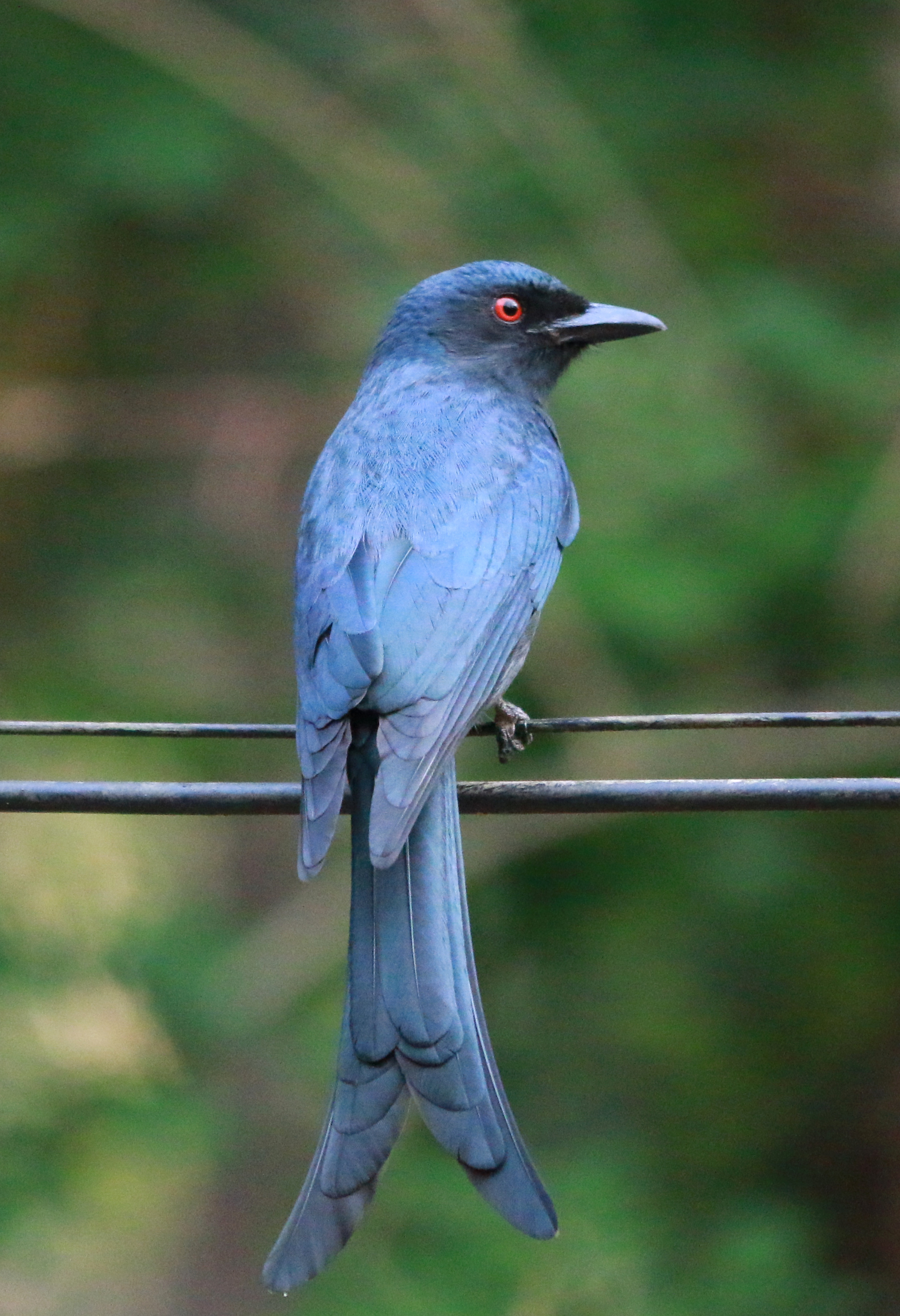 Ashy drongo കാക്കത്തമ്പുരാൻ, കാക്കത്തമ്പുരാട്ടി, പാലക്കാട് ജില്ലയിലെ കൂറ്റനാട് നിന്നും എടുത്ത ചിത്രം